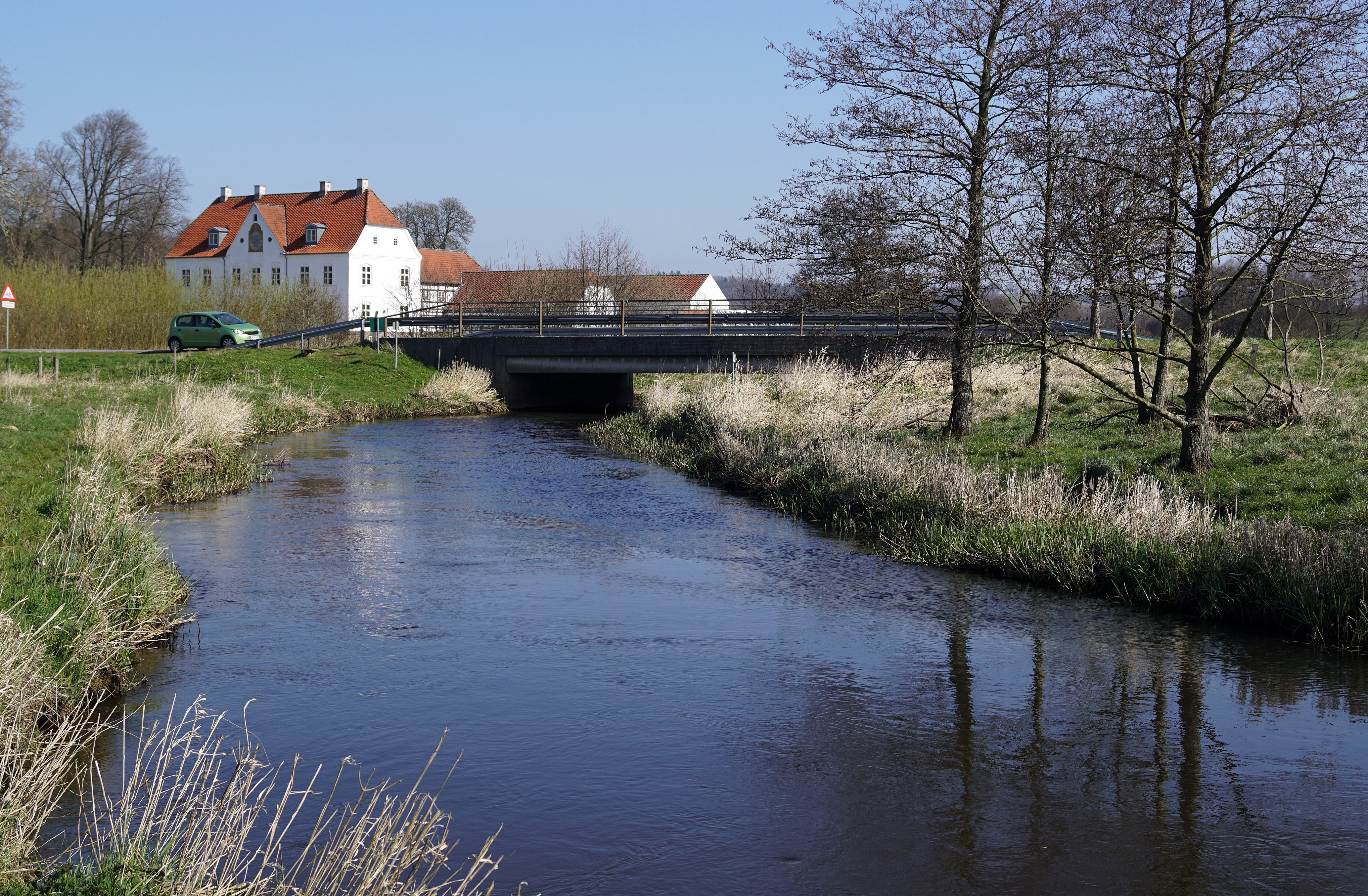 Vejle Å ved Haraldskær